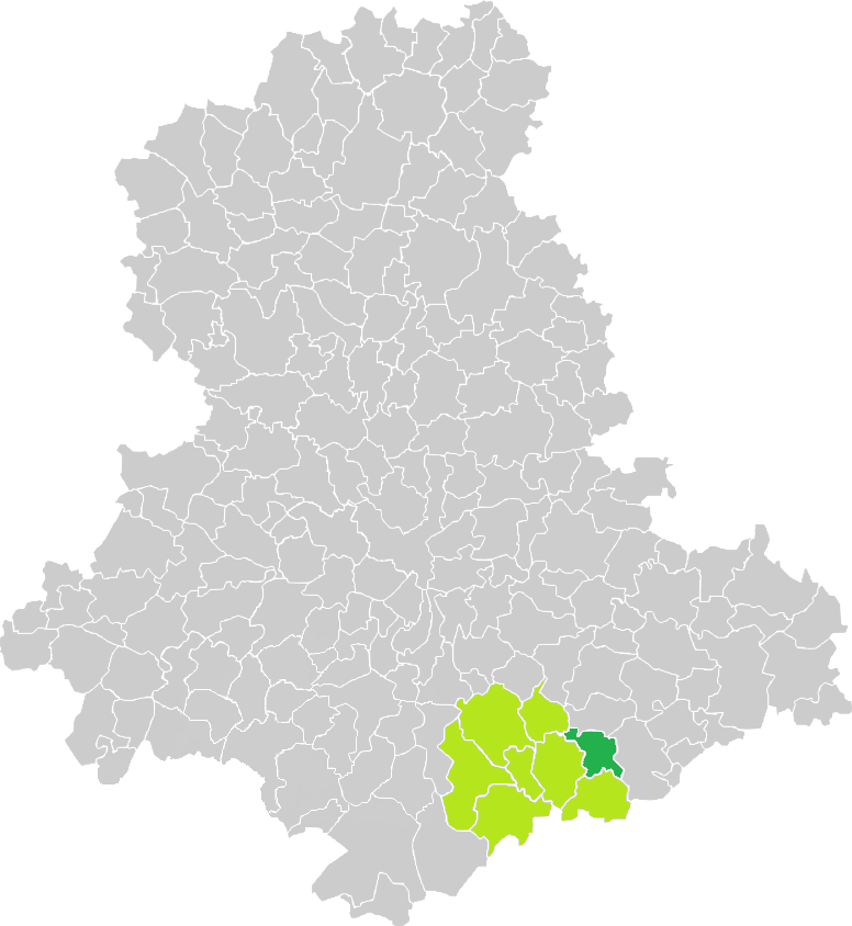 Carte de situation de la commune de Saint-Vitte-sur-Briance (en vert foncé) dans le votre Canton (en vert clair) sur une carte des communes de la Haute-Vienne